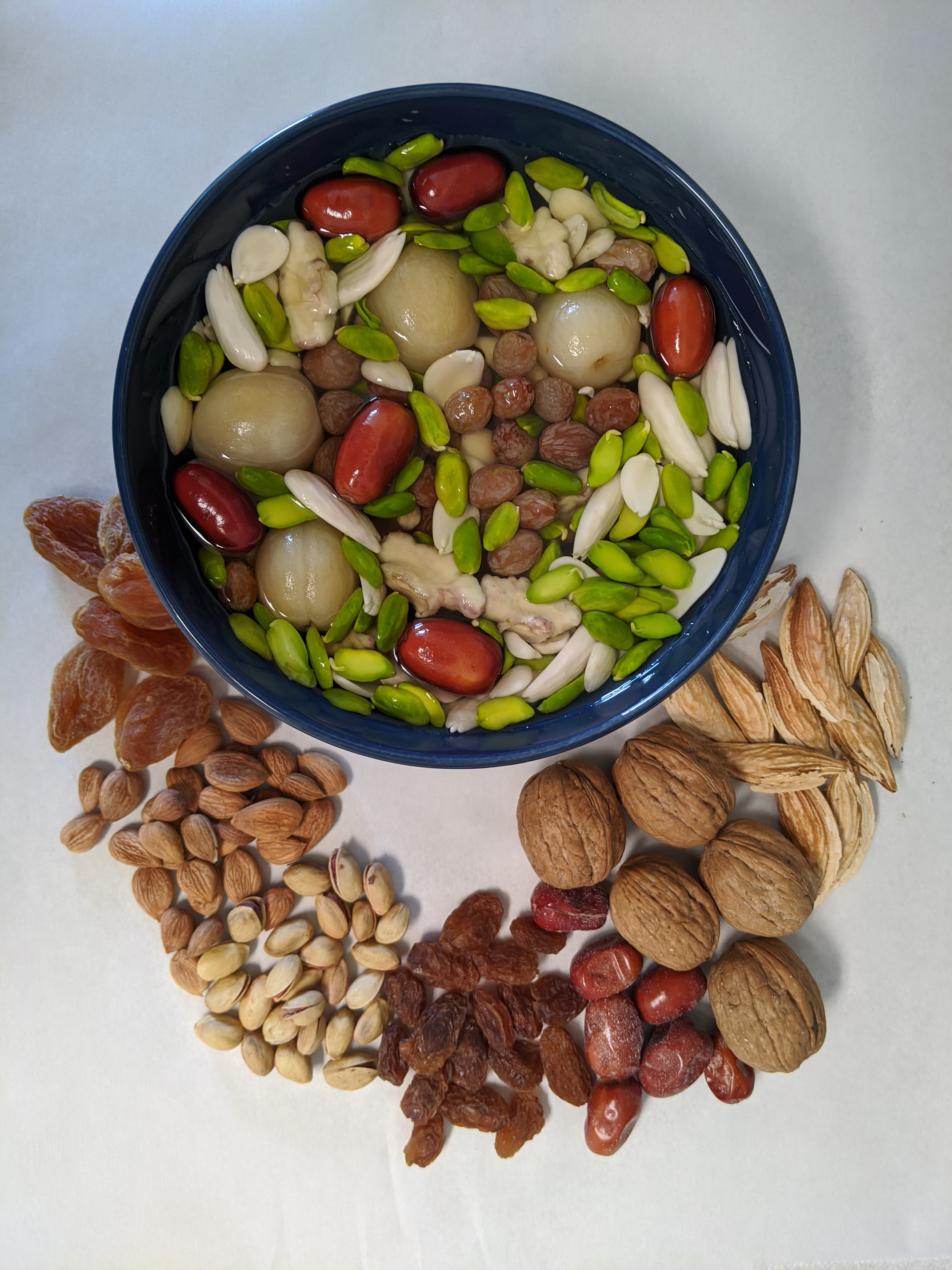 کشمش٬ پسته٬ چارمغز٬ غولنگ (کشته٬اشتق)٬ سنجد٬ بادام٬ خسته